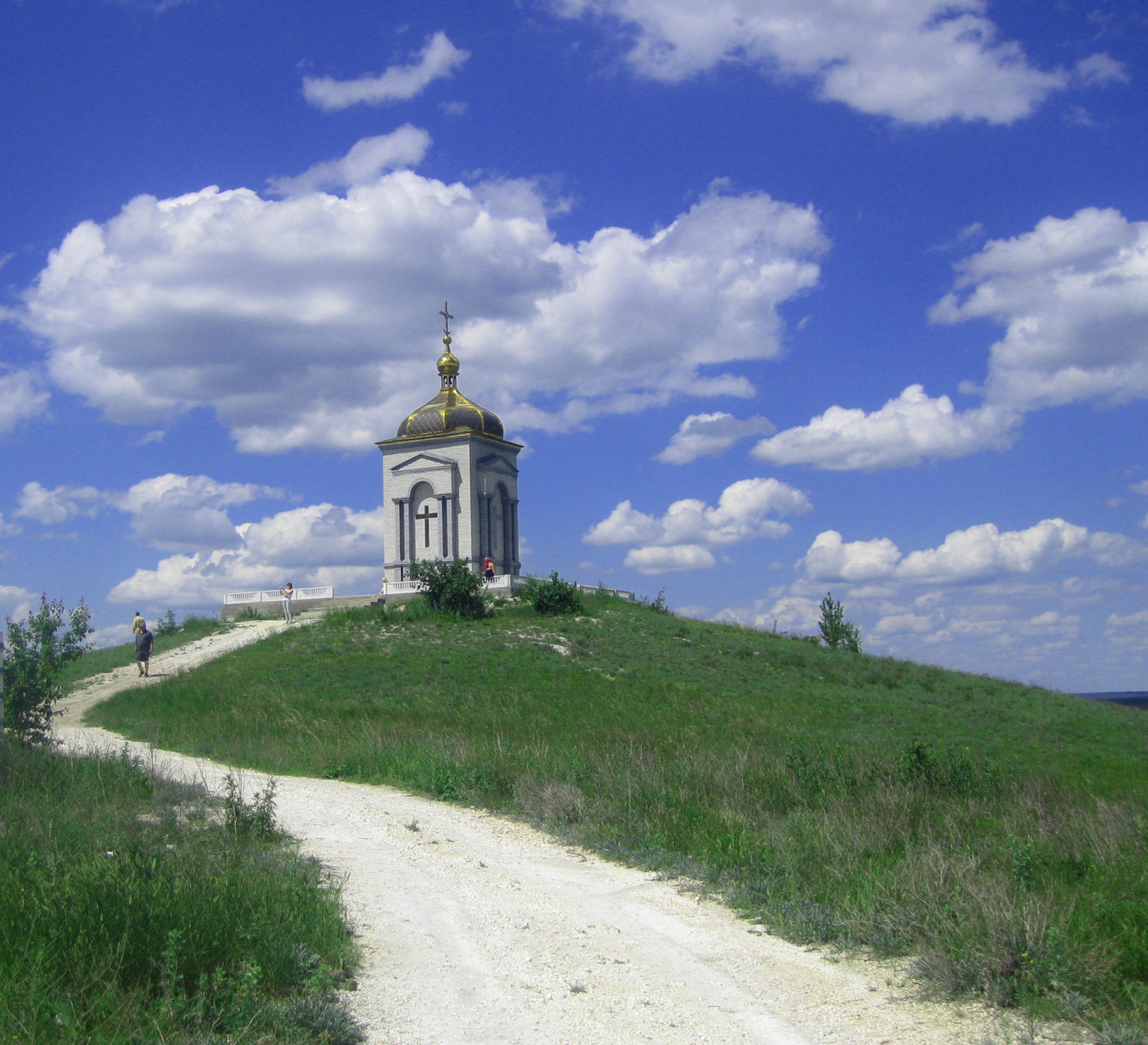 Пам'ятка природи місцевого значення Мар'їна гора біля села Серебрянка Артемівського району Донецької області.